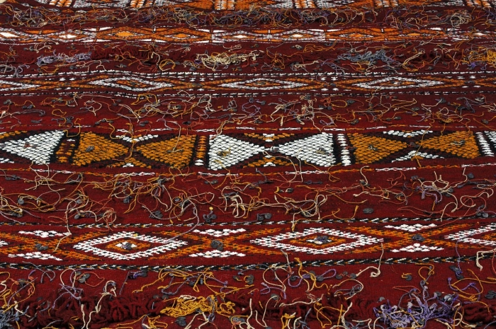 Behalve als vloerkleed, wordt het kleed gebruikt om over het zadel van een paard of muildier gelegd worden. Dit kleed is afkomstig van de Ayt Bou Zemmour (bekend in Marokko onder de naam Zemmour), een confederatie van Berberbevolkingsgroepen die zich tussen de steden Rabat en Meknes bevindt. De gesproken taal van Zemmour confederatie is het Tamazight, een taalvariant van het Berbers dat in de Midden-Atlas en centraal Marokko wordt gesproken. De nomadische levenswijze is geen standaard meer bij deze confederatie en men leeft tegenwoordig (info 2004) geheel gesedentariseerd. De belangrijkste stedelijke handelcentra van deze streek zijn Khemissat en Tifelt.